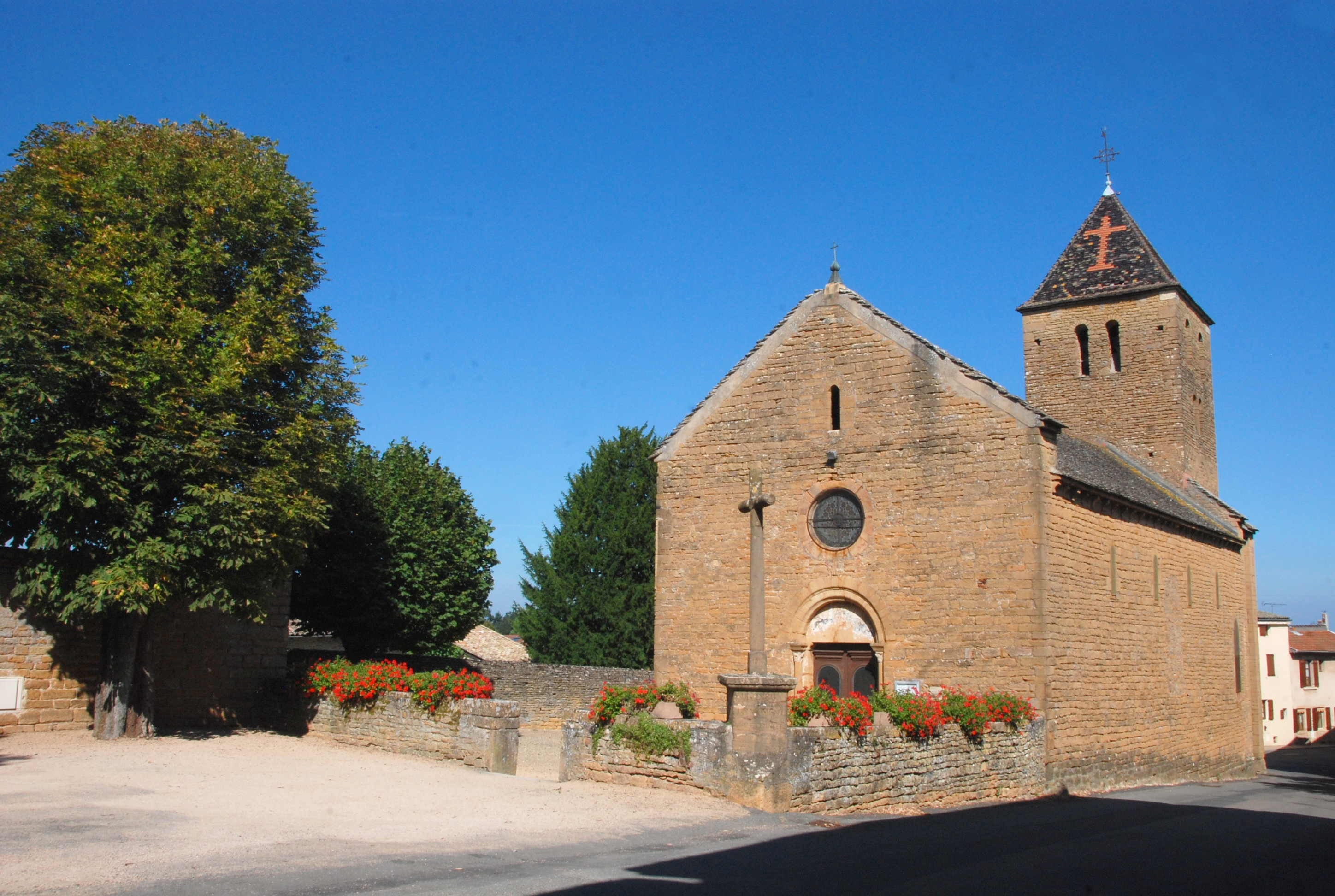 Église Saint-Georges de Vinzelles, (Inscrit, 1929) .